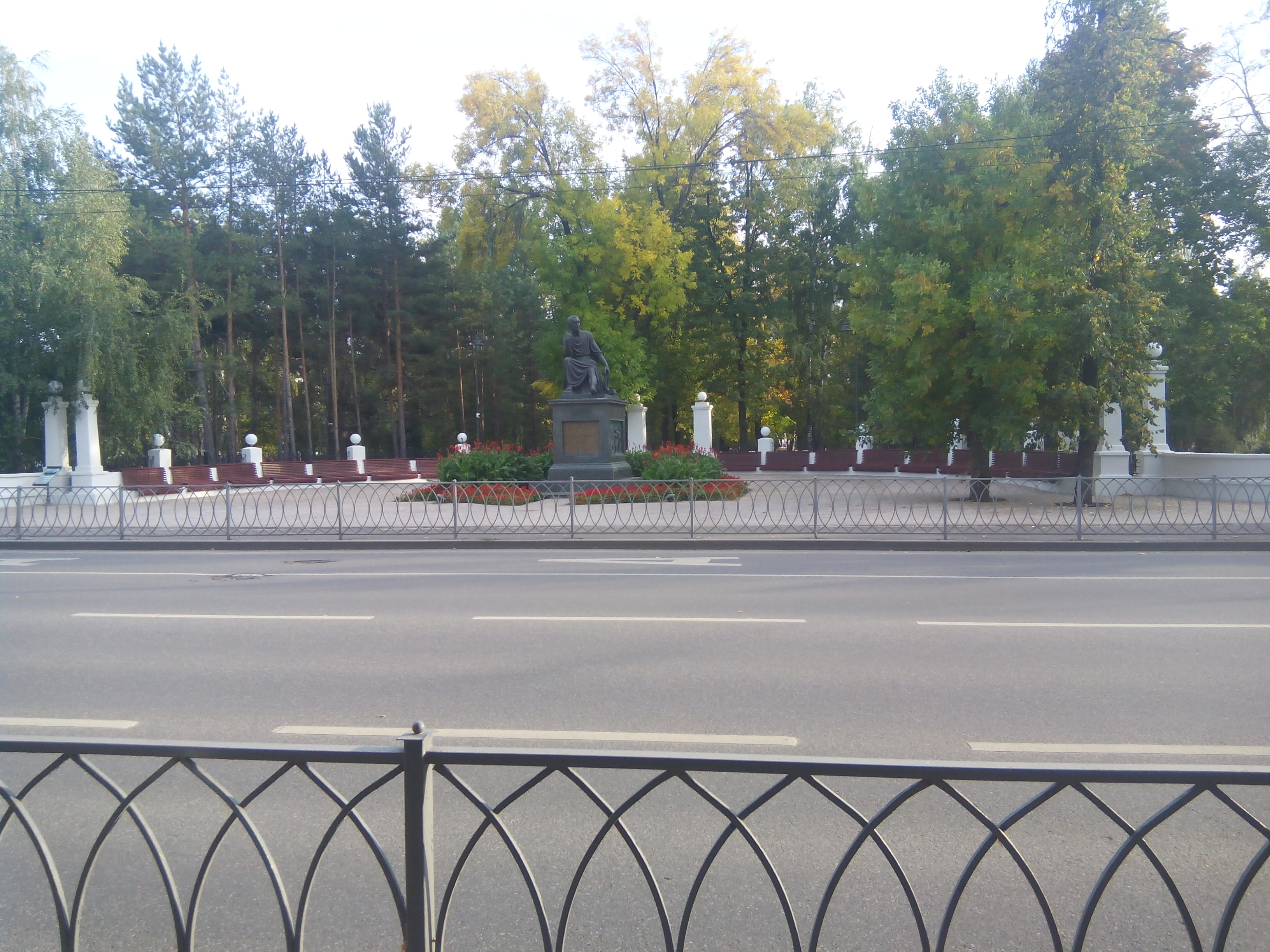 Улица Горького с памятником Державину перед Лядским садом